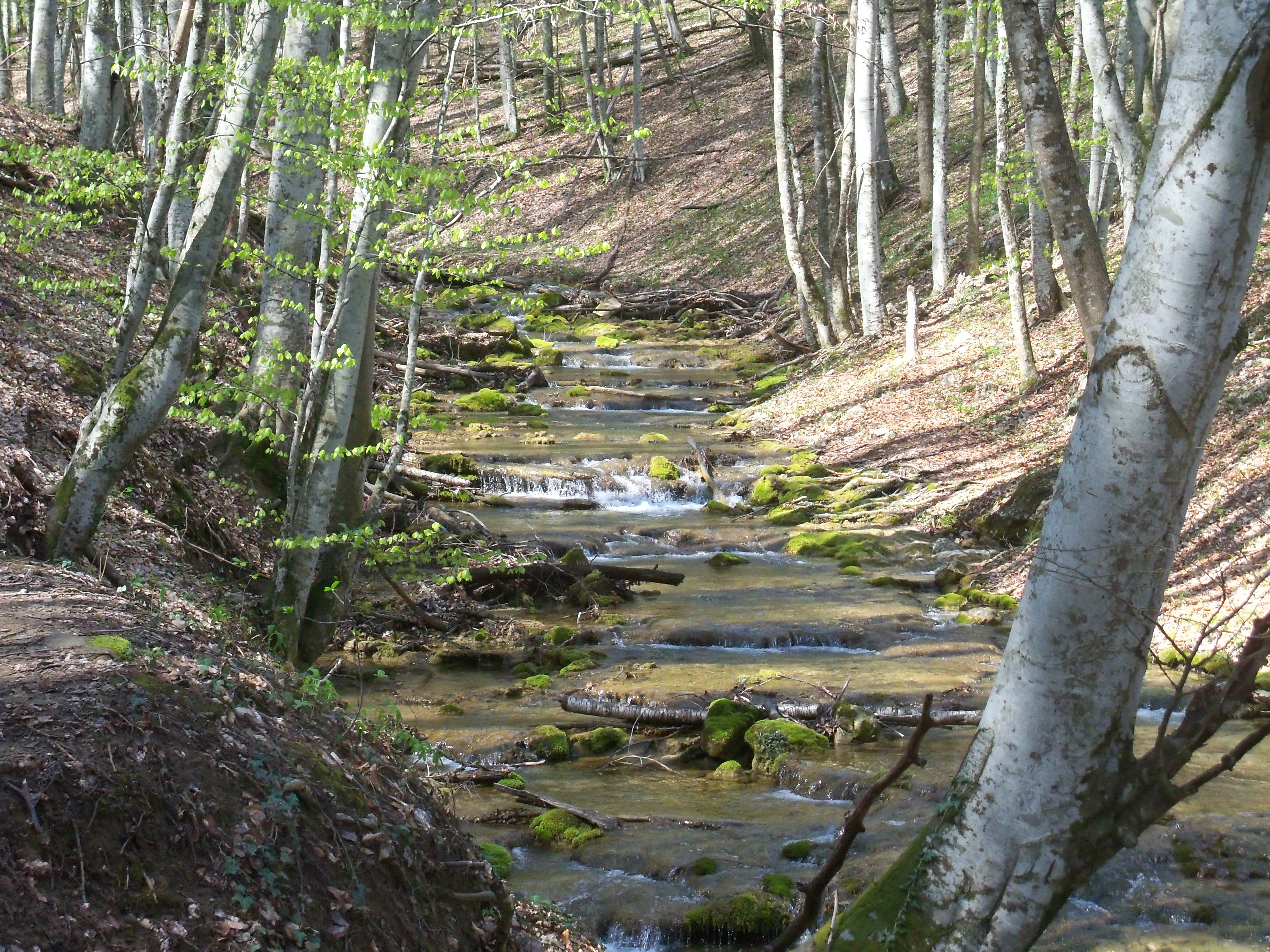 Река Сары-Узень